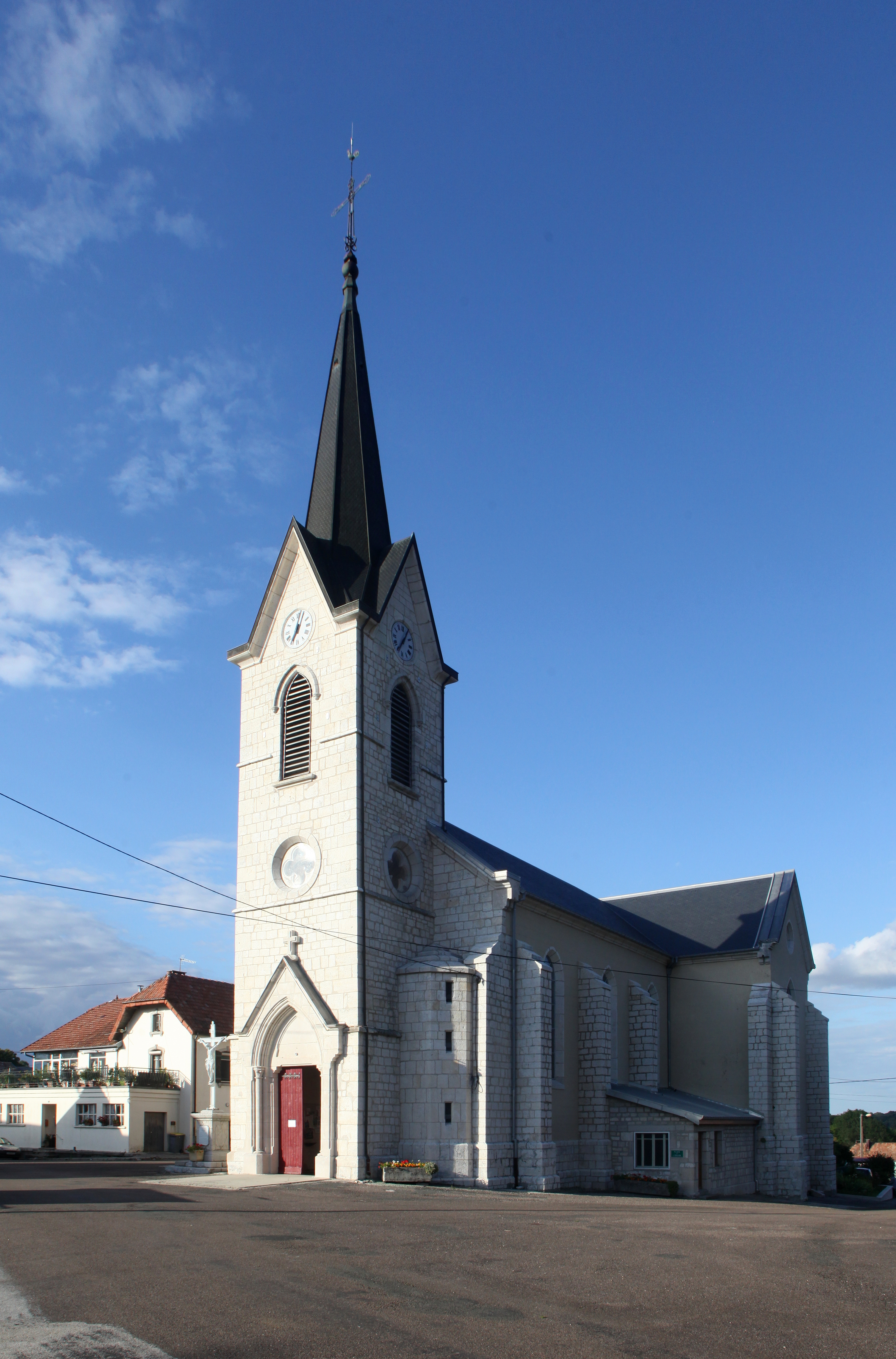 Église de Reugney (Doubs).